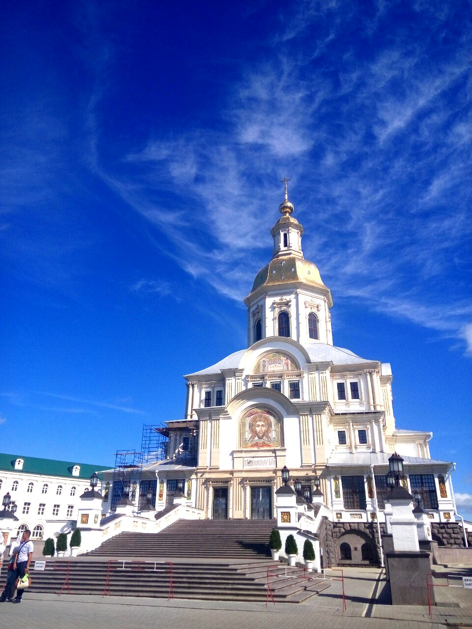 ансамбль Серафимо-Дивеевского монастыря: Дивеево, Дивеевский район, Нижегородская область